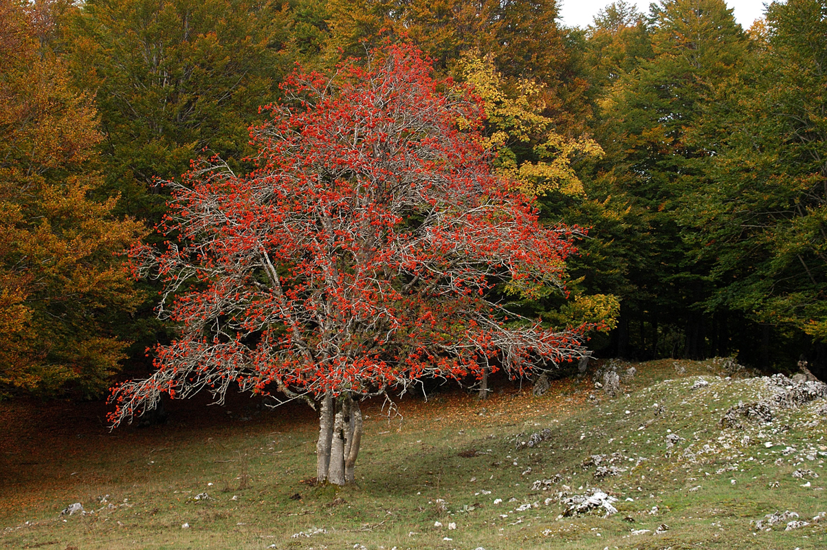 Lo si incontra nella Settima Tappa del CNP all'interno del Parco Regionale dei Monti Simbruini